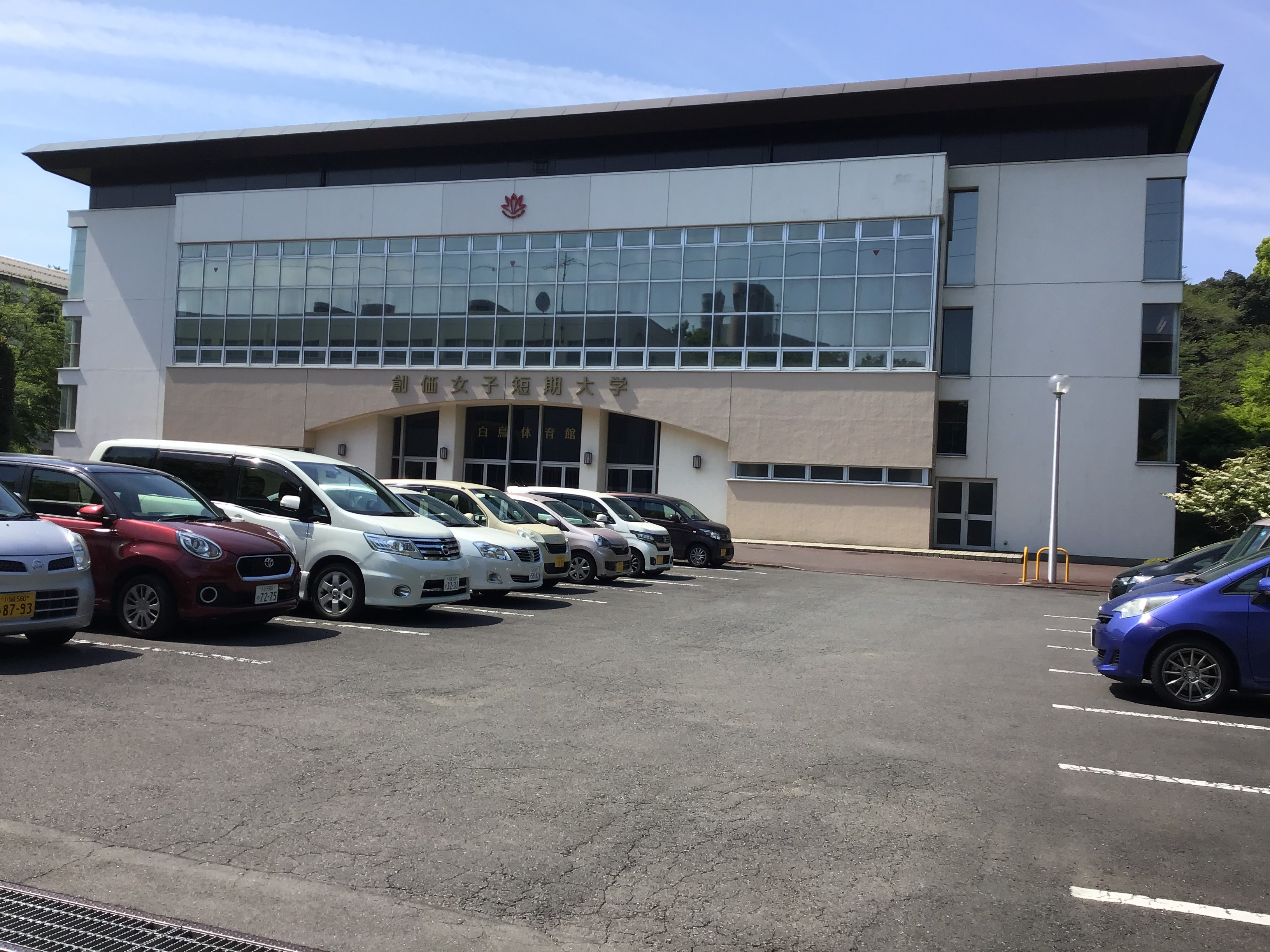 東京都、八王子市。